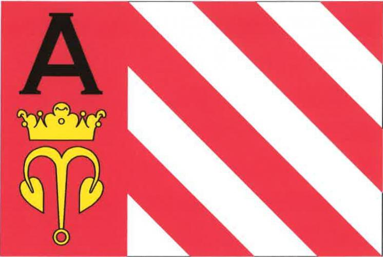 Adamov (CB), vlajka. List tvoří červený žerďový pruh široký třetinu délky listu a osm střídavě bílých a červených kosmých pruhů. V žerďovém pruhu černé písmeno A nad obrácenou kotvou převýšenou korunou, obojí žluté. Poměr šířky k délce listu je 2 : 3.